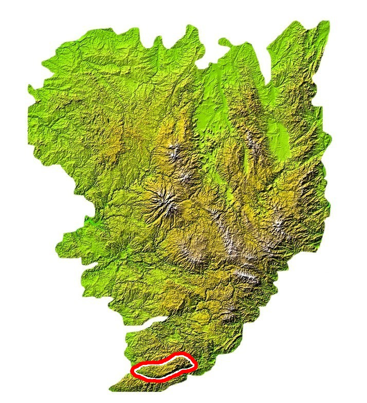 Situation du massif de l'Espinouse sur la carte du Massif central